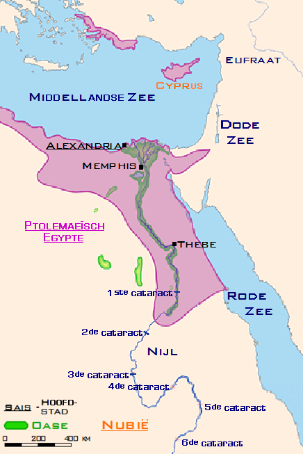 Ausdehnung des alten ägytischen Reiches (griechische Zeit) Karte wurde selbst erstellt Dutch translation